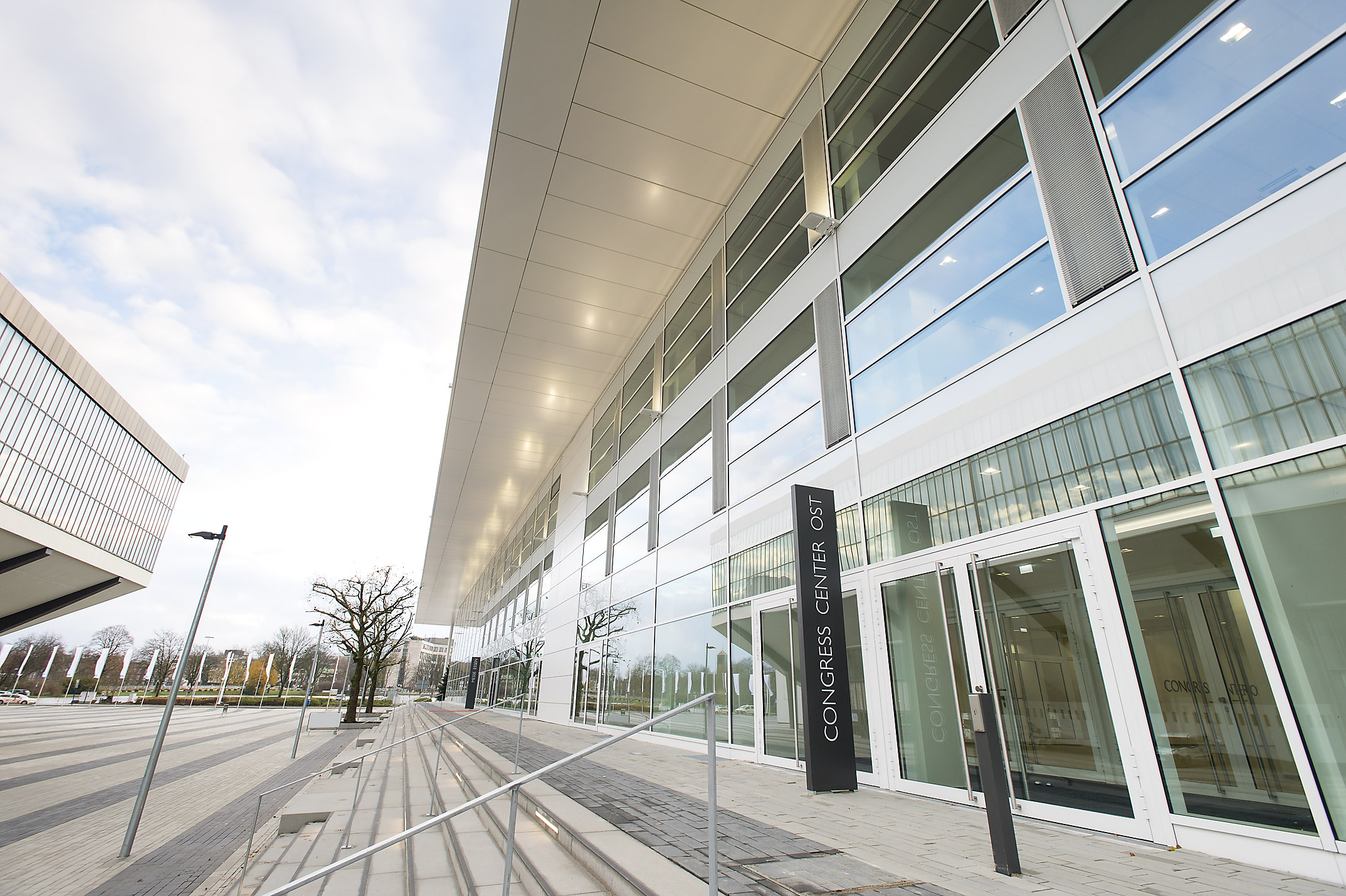 Messe Essen feiert den Abschluss der ersten Bauphase. In der Messe Essen fand ein Festakt mit rund 500 geladenen Gästen aus Politik, Wirtschaft, Medien und der Messebranche statt, um den punktgenauen Abschluss der ersten Phase der Messe-Modernisierung zu feiern. Mit der Eröffnung des neuen, 2.000 Quadratmeter großen Glasfoyers mit direkt anschließenden neuen Kongressräumlichkeiten erreicht das im Mai 2016 gestartete Bauprojekt seinen wichtigsten Meilenstein. Gleichzeitig geht die erste Hälfte der neuen, 11.000 Quadratmeter großen Halle 6 mit direktem Blick in den Grugapark in Betrieb.